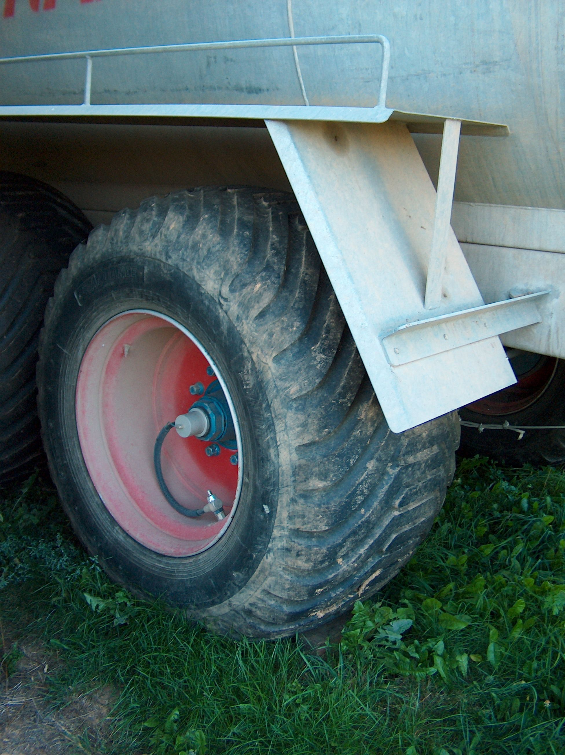 Landwirtschaftsreifen an einem Güllefass, Schlauch der Reifendruckregelanlage sichtbar